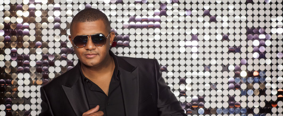 henry mendez